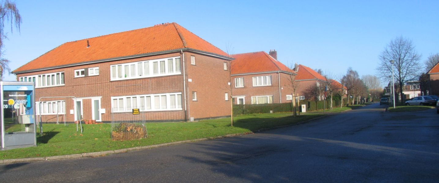 Mechelen, Otterbeek, Karekietstraat (noordoostwaarts). Foto Marc Alcide 25 december 2005